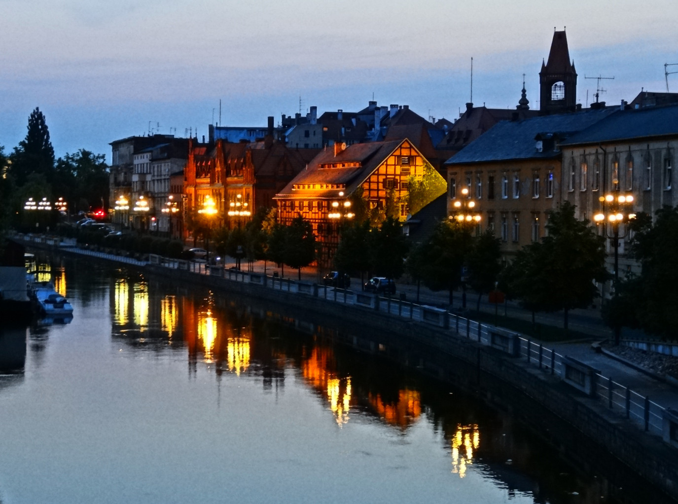 Północne nabrzeże Brdy w centrum Bydgoszczy